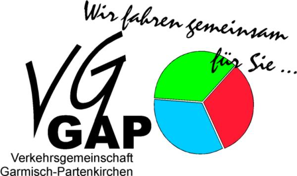 Logo Verkehrsgemeinschaft Garmisch-Partenkirchen